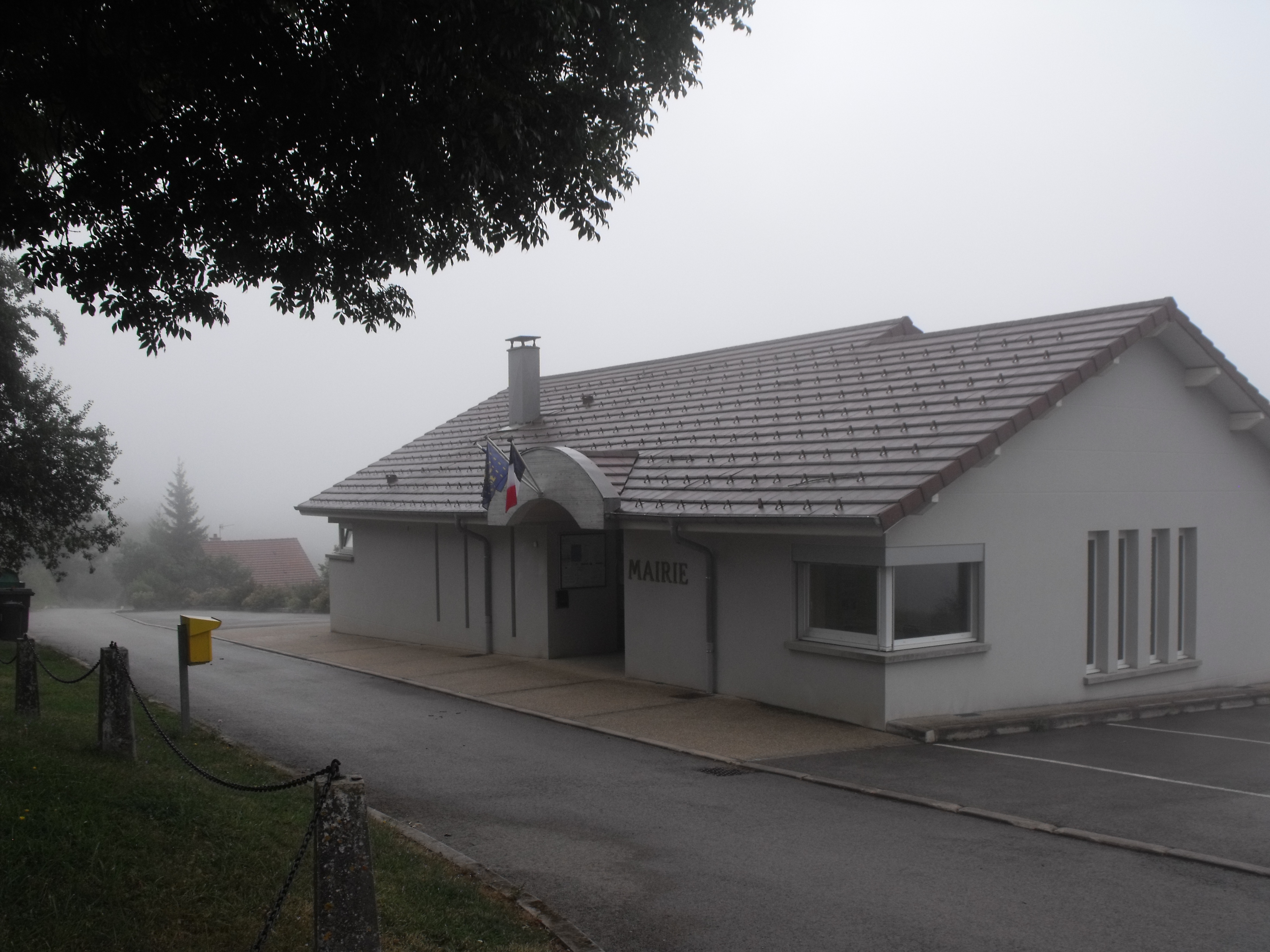 Mairie de Valoreille, Doubs, France